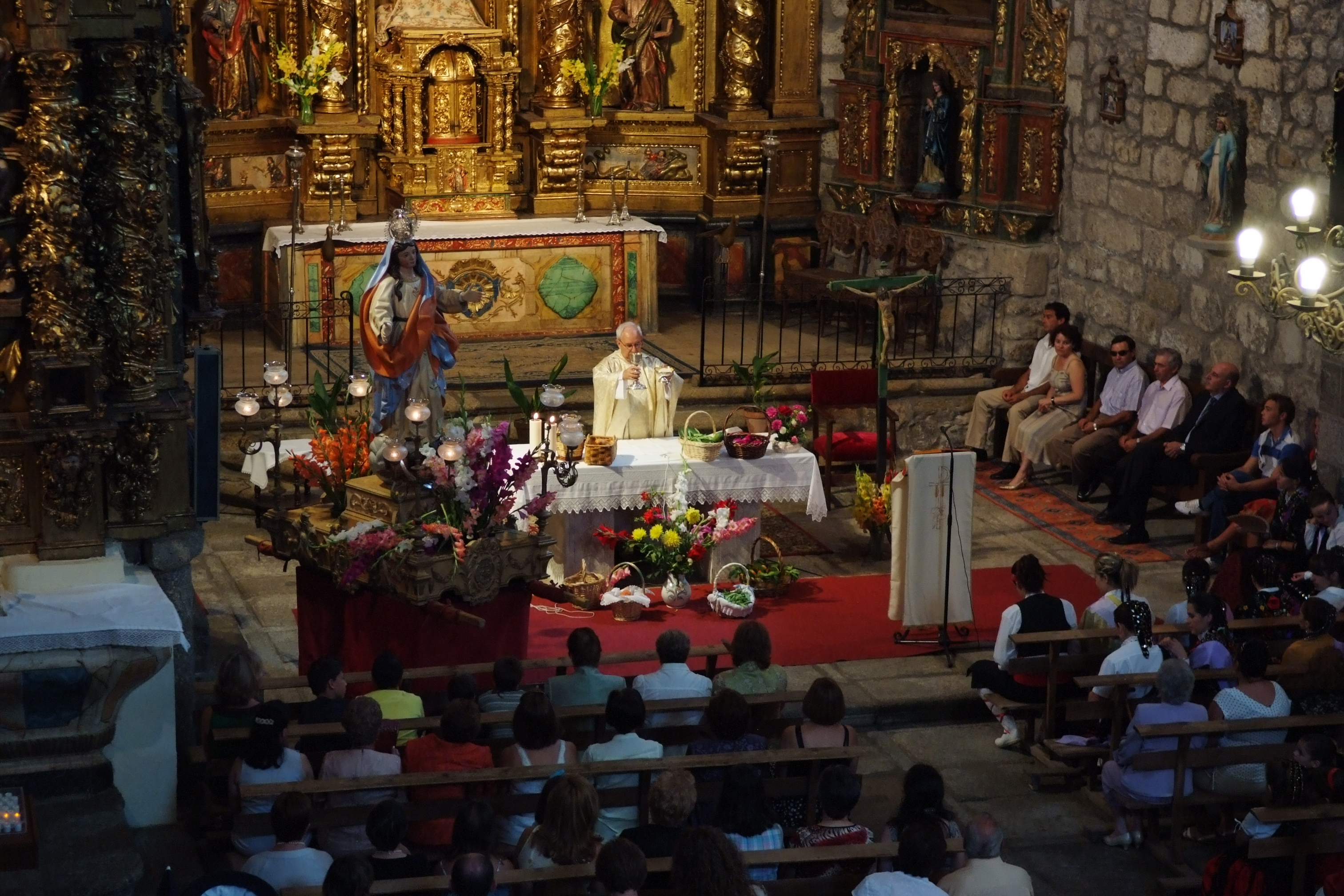 Celebración litúrgica en la parroquial de Villafranca de la Sierra (15 de agosto de 2009)